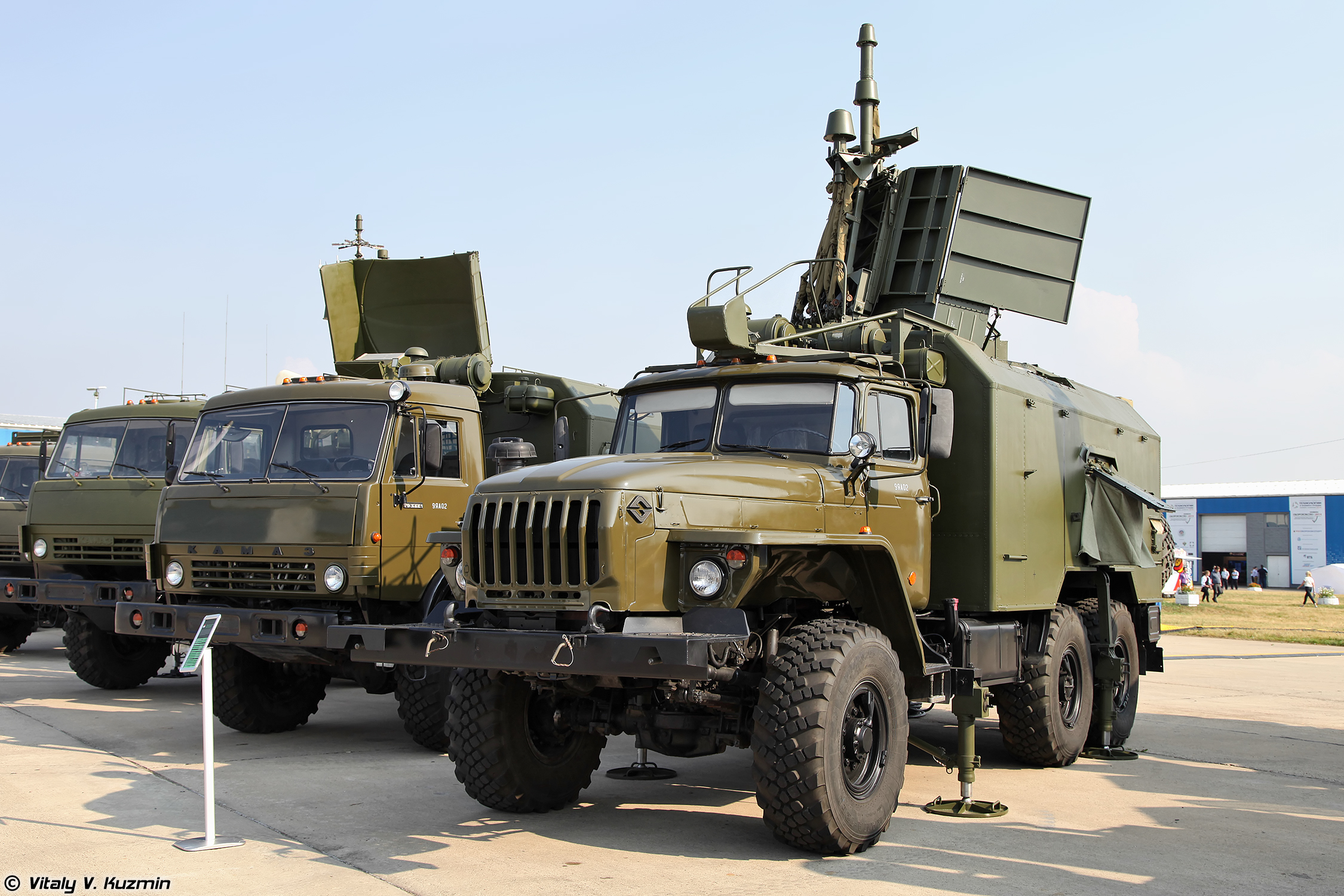 Комплекс исполнительной радиотехнической разведки 1Л222 Автобаза (1L222 Avtobaza electronic intelligence and jamming system)